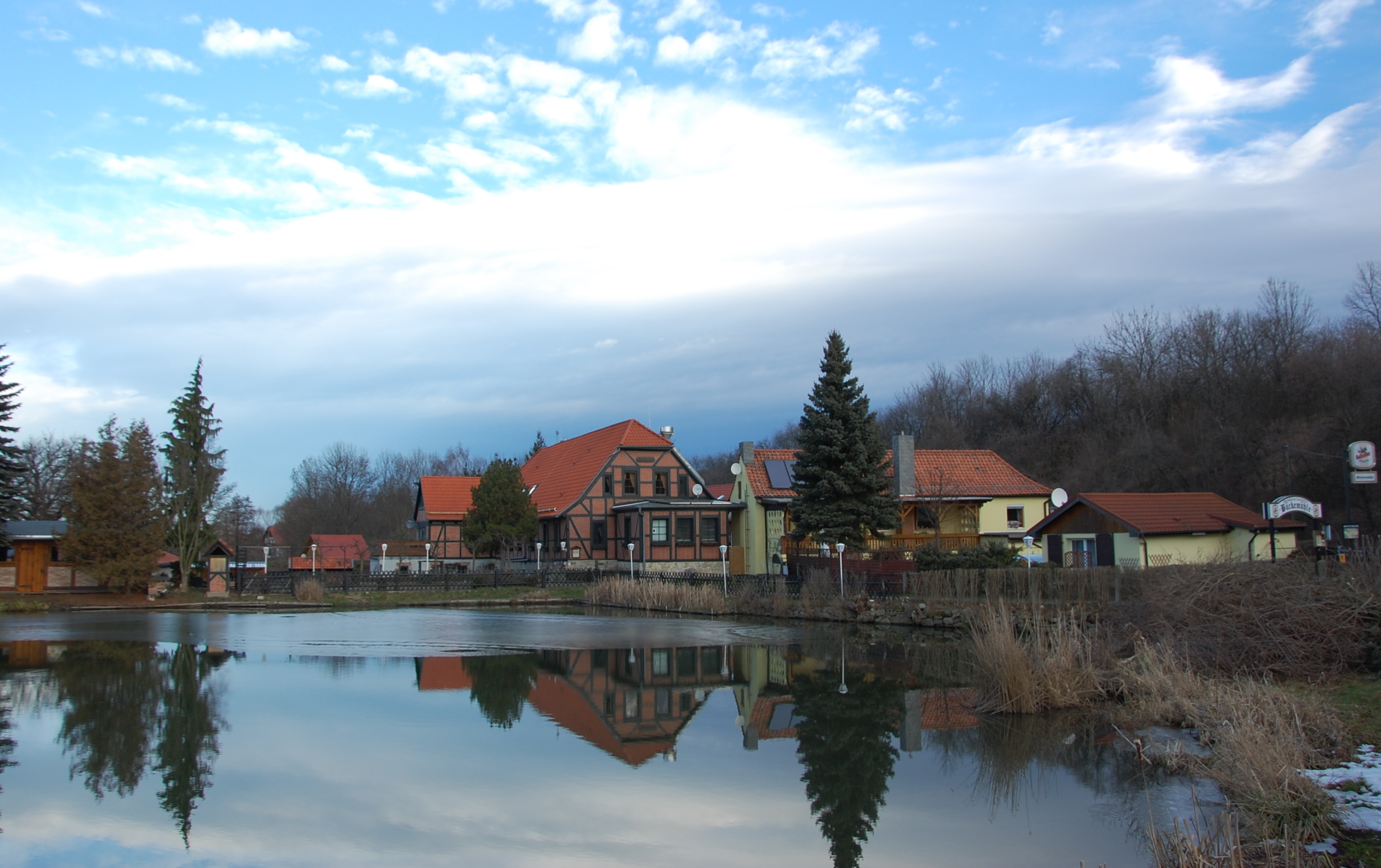 Haus Am Bückeberg 3 in Gernrode